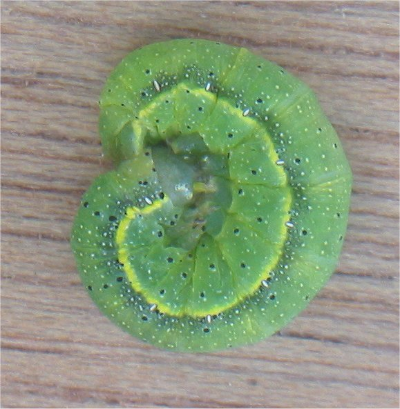 (nl: Groente-uil) Lacanobia oleracea